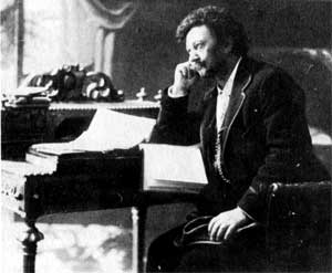 Laza Kostić (1841–1909)